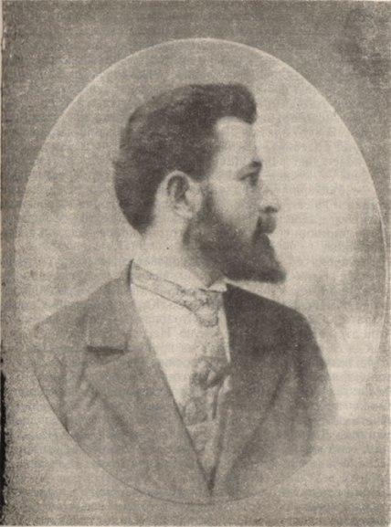 Никола Карев.